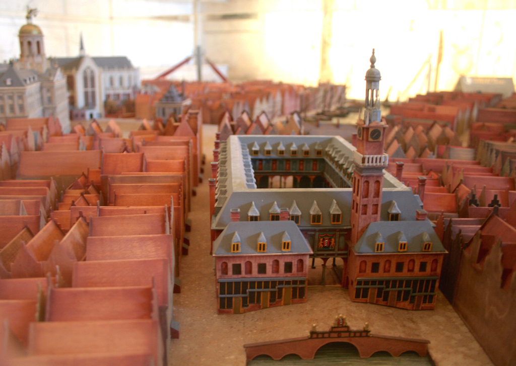 Maquette Beurs van Hendrick de Keyser, zijde Rokin. Geëxposeerd in het Paleis op de Dam; 2005. Foto: Erik Swierstra.